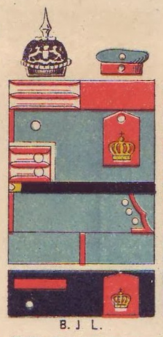 Schematische Farbdarstellung der Uniform des Bayerischen Infanterie-Leib-Regiments: Hellblauer Waffenrock mit hochrotem Kragen und weißen Litzen; rote schwedische Ärmelaufschläge mit weißen Litzen; rote Schulterstücke mit gelber Krone; Pickelhaube mit bayerischem Emblem.